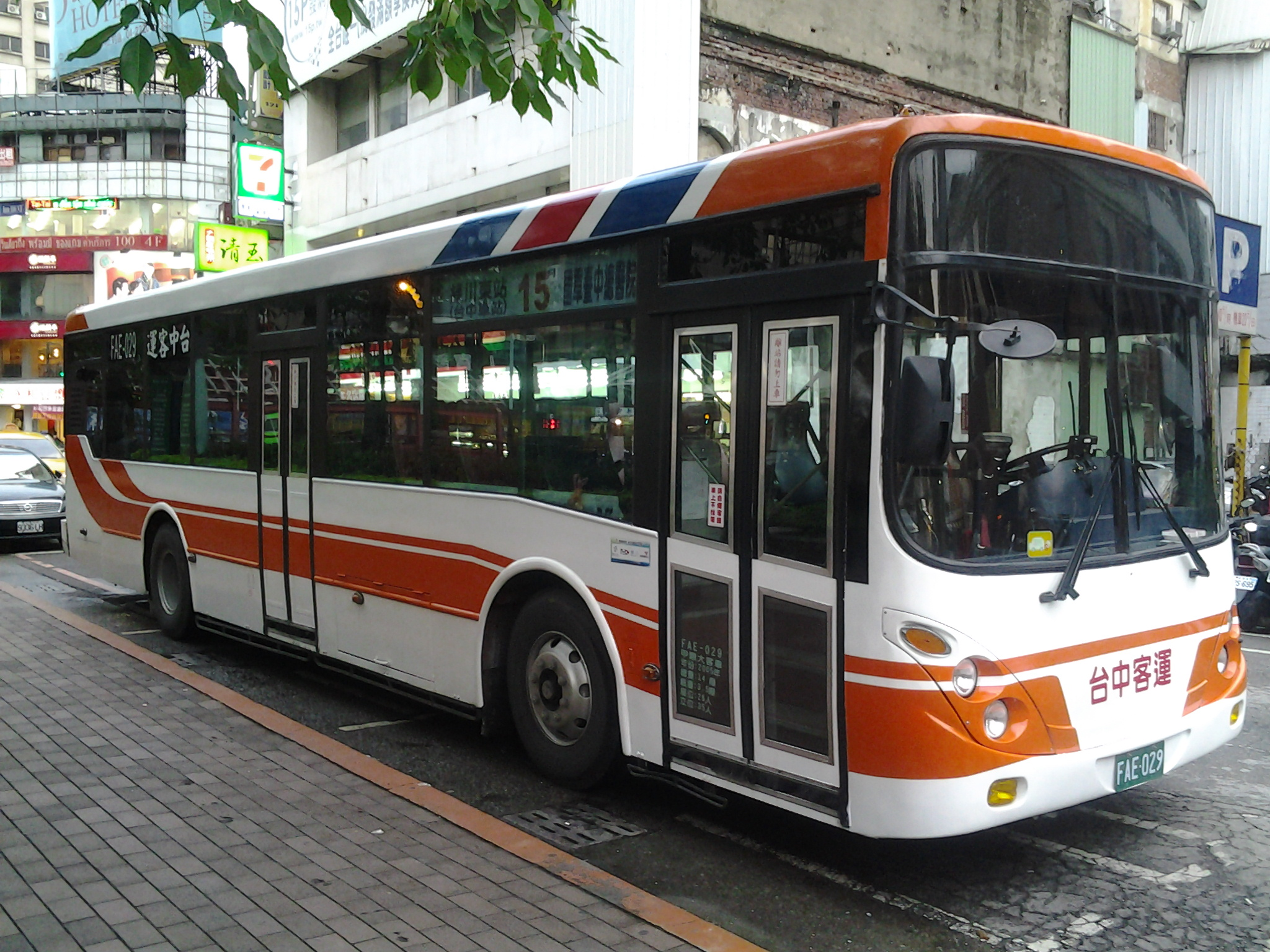 2005〈2005〉 HINO ERK1JRL（馨盛）